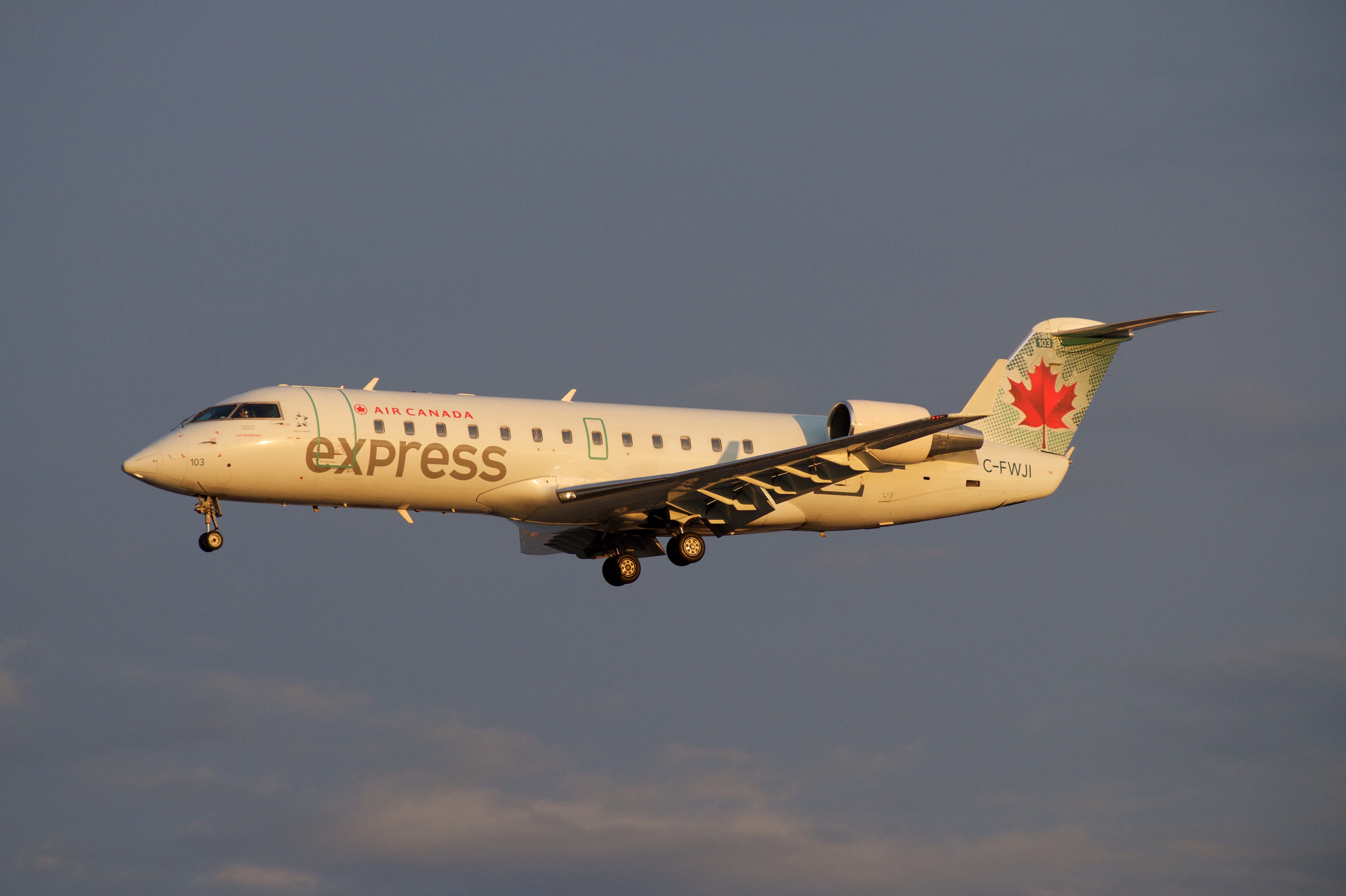 Close final, YYZ